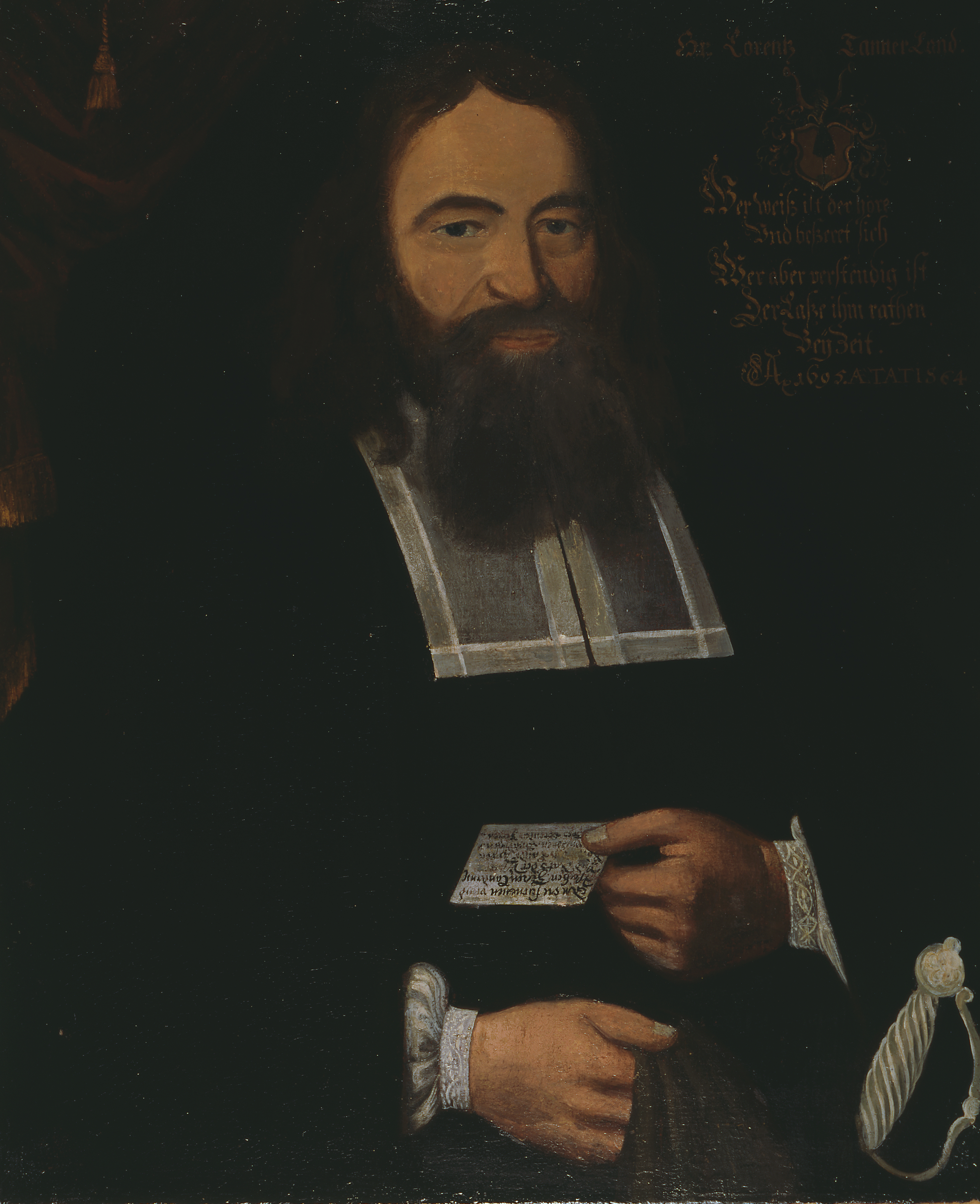 14. Landammann von Appenzell Ausserrhoden, Brustbildnis